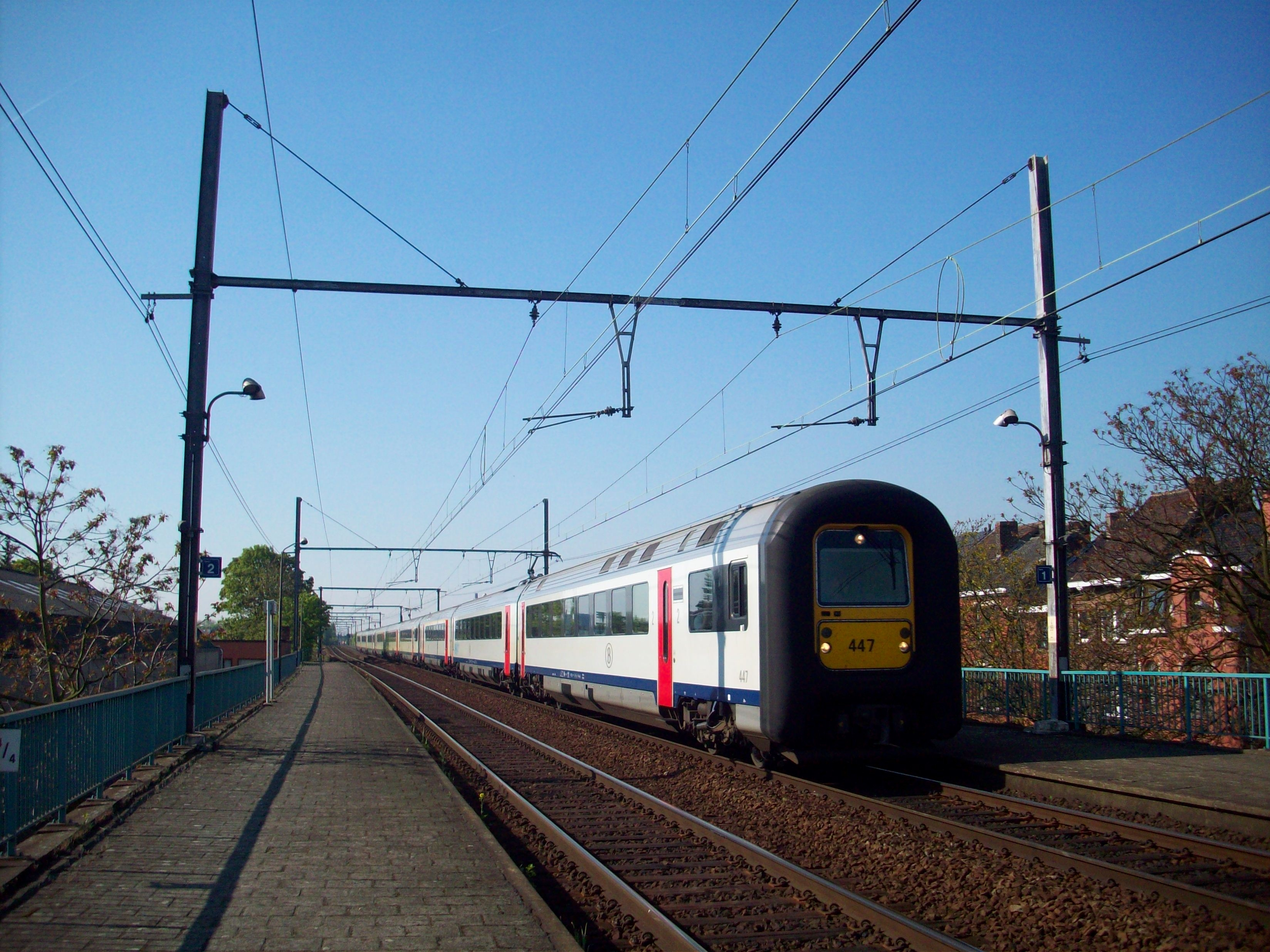 Foto van een 'Deense neus'